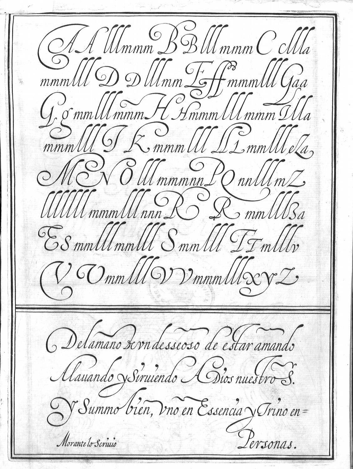 Autor: Diaz Morante, Pedro Descripción bibliográfica: Nueua arte de escreuir inventada con el fabor de Dios / por P[edro] Morante ; con la qual sabran escreuir en muy breue tie[m]po y con gran destreza y gala todos los que con cuenta y cudicia la imitaren y con particularidad hombres y mancebos . - Nueva arte de escrevir. - Madrid : [s.n.], 1615-1631. - [82] h. : il., lám. ; 4º Materia: Escritura - Estudio y enseñanza Materia: Caligrafía Notas: Retrato del autor grab. calc. al principio de la obra . - Álbum facticio compuesto por una serie de láminas de Morante, fechadas entre 1615 y 1631, algunas recortadas y pegadas, con numeración correlativa a mano Lugar de impresión: España. Madrid Localización: Vea la ilustración en su contexto Libro completo